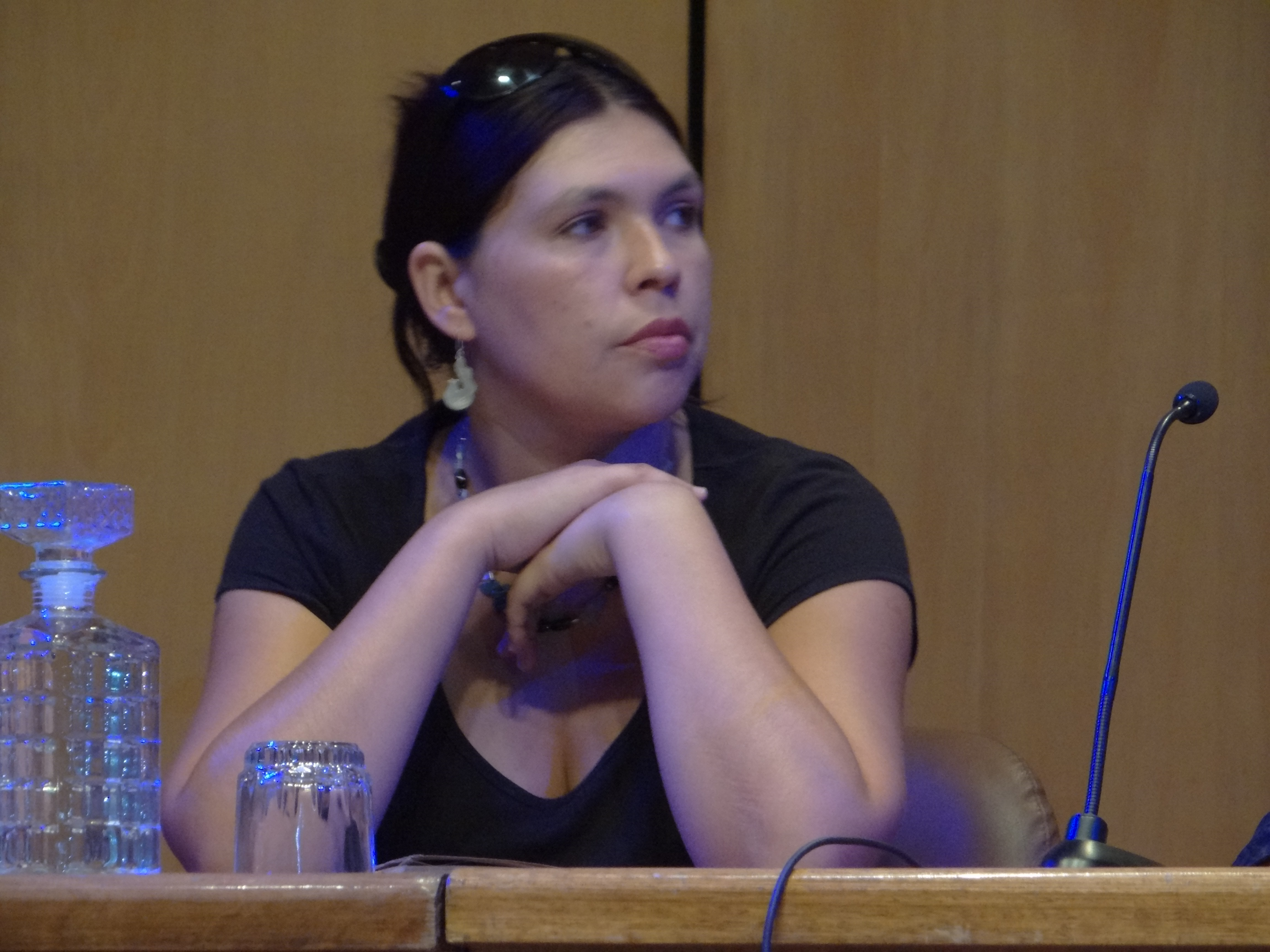 Bárbara Figueroa, presidenta CUT.